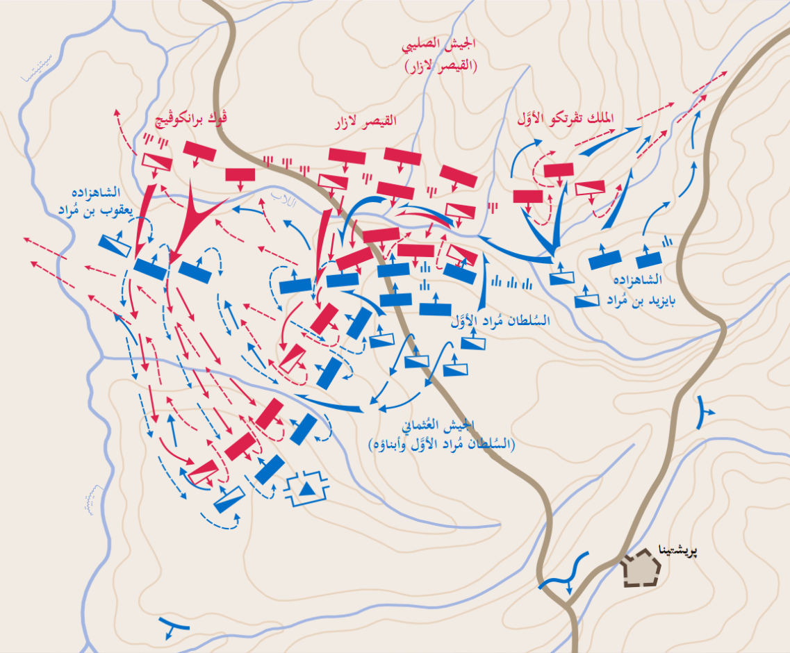 مُخطط معركة قوصوه سنة 1389م بين الصليبيين والعُثمانيين.